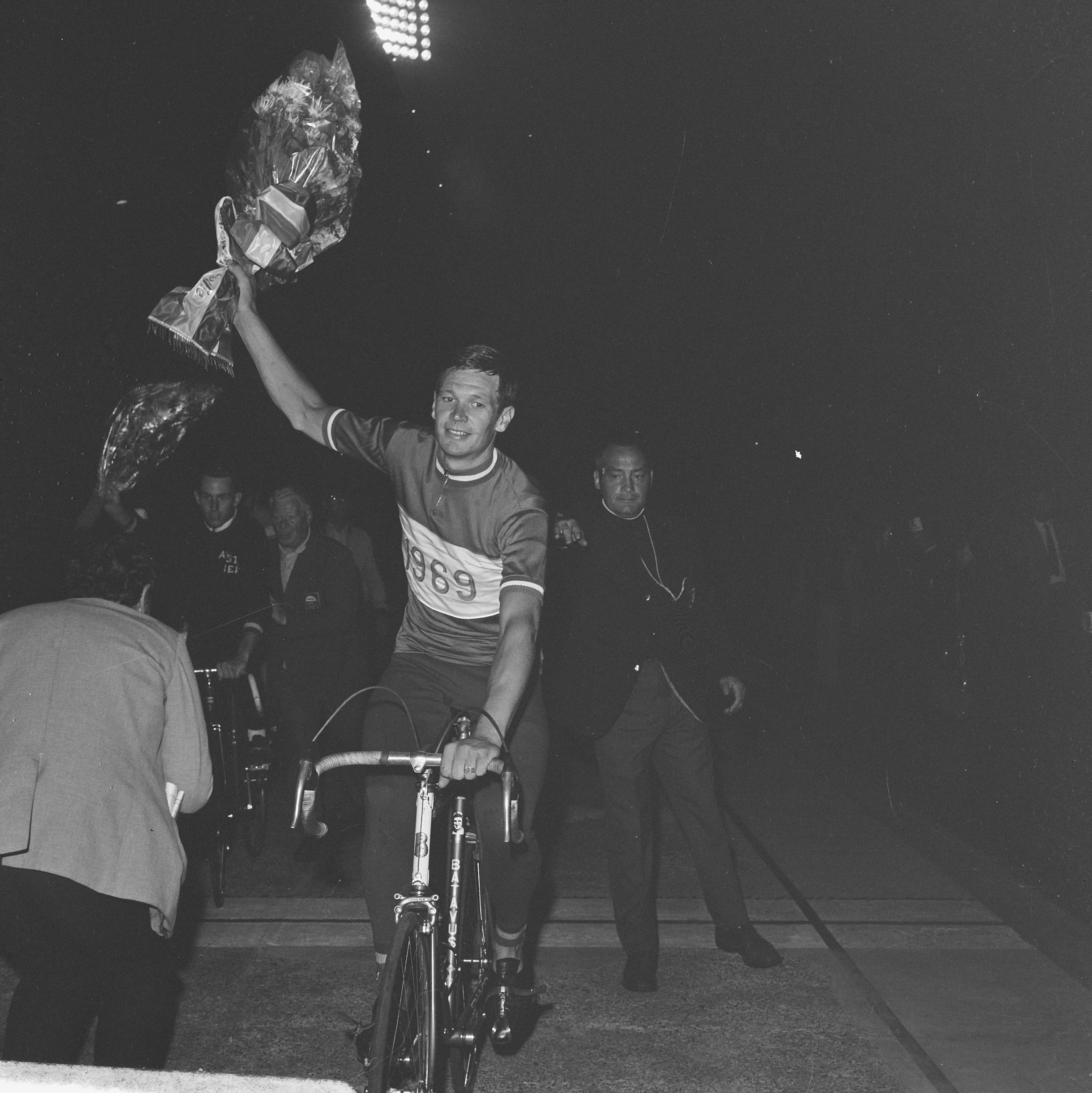 Collectie / Archief : Fotocollectie Anefo Reportage / Serie : Nationale Baankampioenschappen 1969 in het Olympisch Stadion te Amsterdam Beschrijving : Nationale Baankampioenschappen in Olympisch Stadion; Piet Hoekstra (kampioen achtervolging amateurs) Datum : 31 juli 1969 Locatie : Amsterdam, Noord-Holland Trefwoorden : wedstrijden, wielersport, wielrennen Persoonsnaam : Hoekstra, Piet Fotograaf : Koch, Eric / Anefo Auteursrechthebbende : Nationaal Archief Materiaalsoort : Negatief (zwart/wit) Nummer archiefinventaris : bekijk toegang 2.24.01.03 Bestanddeelnummer : 922-6758